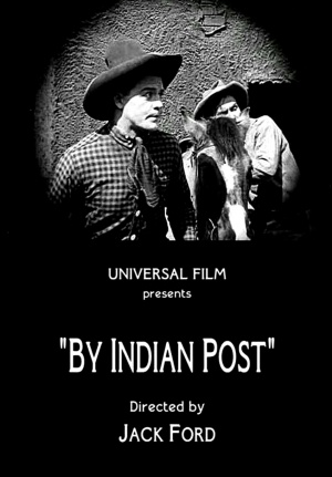 Cartel anunciador de la película de Jack Ford By Indian Post (1919)